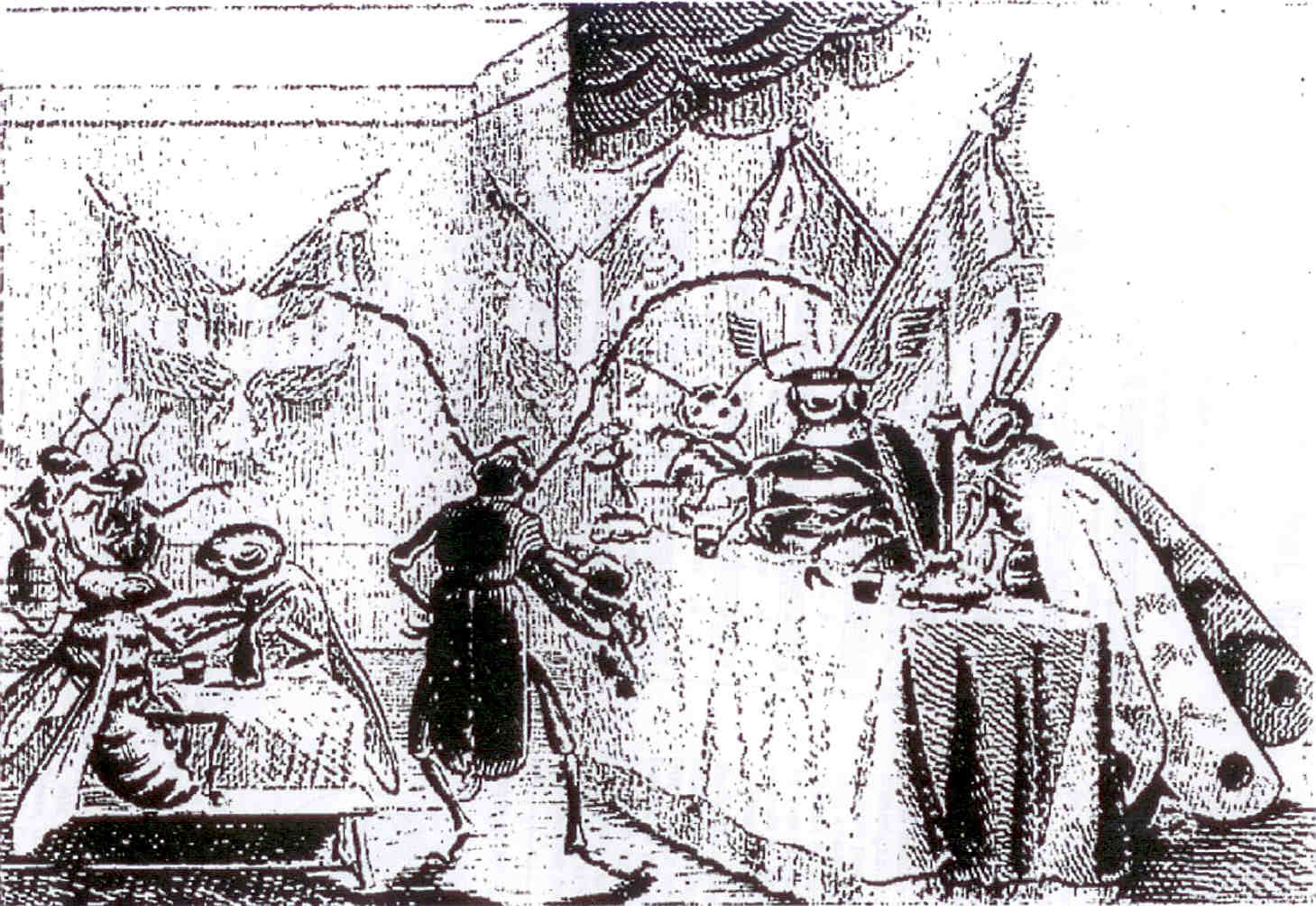 Vision humoristique de la Goguette des Insectes où a été donnée aux participants humains l'apparence de vrais insectes.